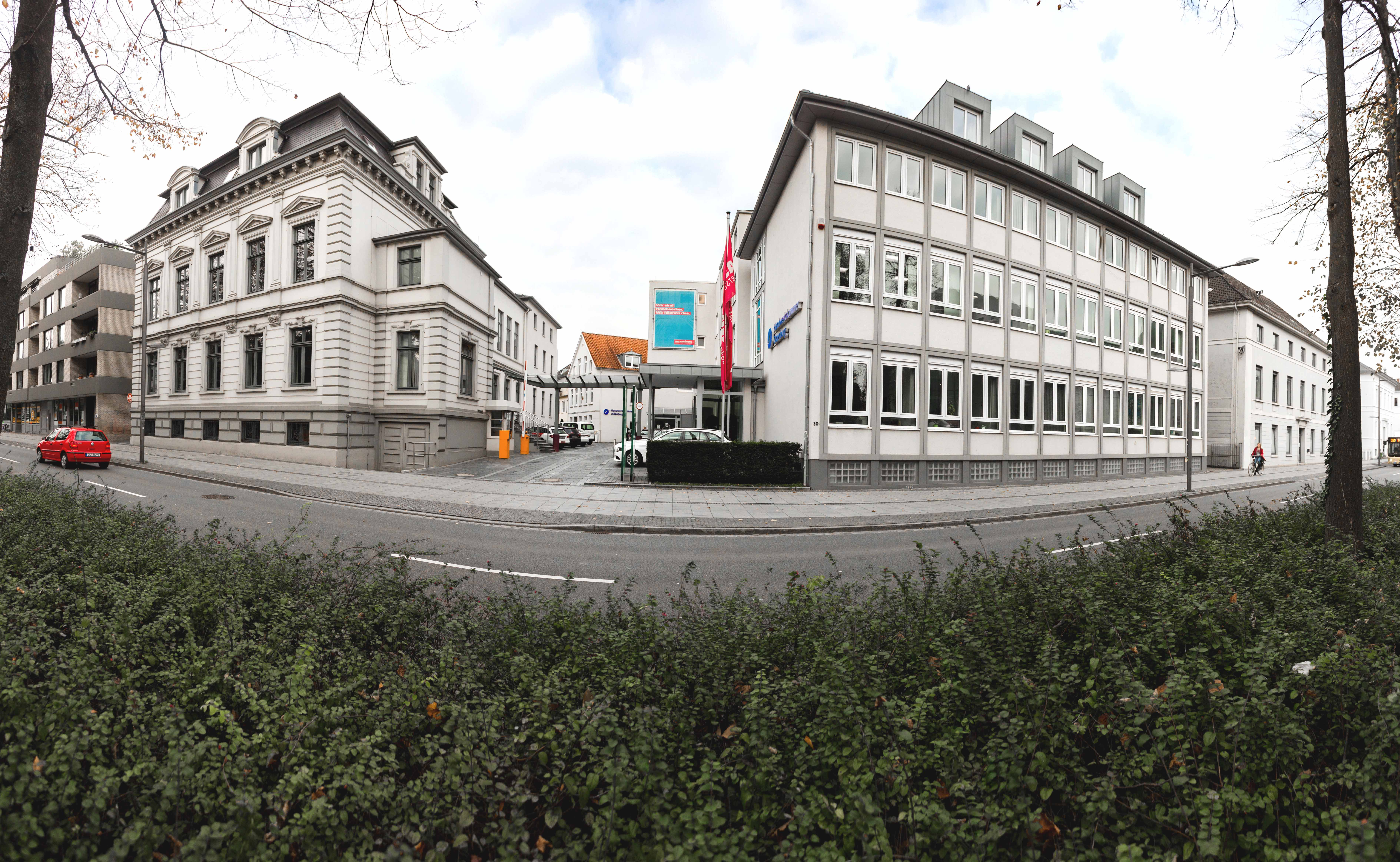 Verwaltungsgebäude der Handwerkskammer Oldenburg am Theaterwall in Oldenburg